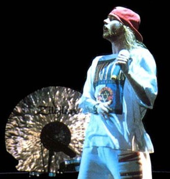 אקסל רוז בהופעה בישראל